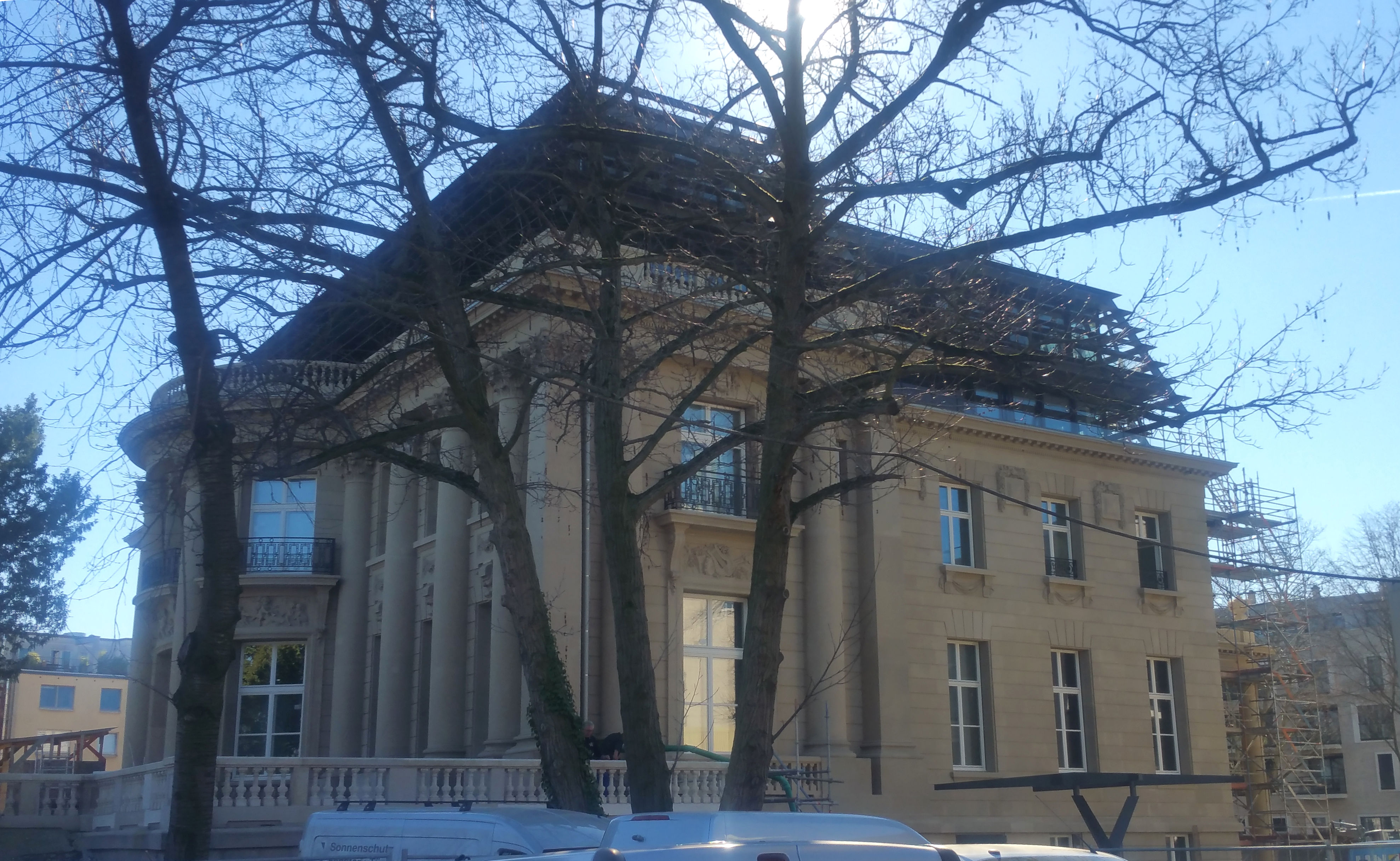 Villa Oppenheim, Köln-Bayenthal. Nord-Ost-Seite